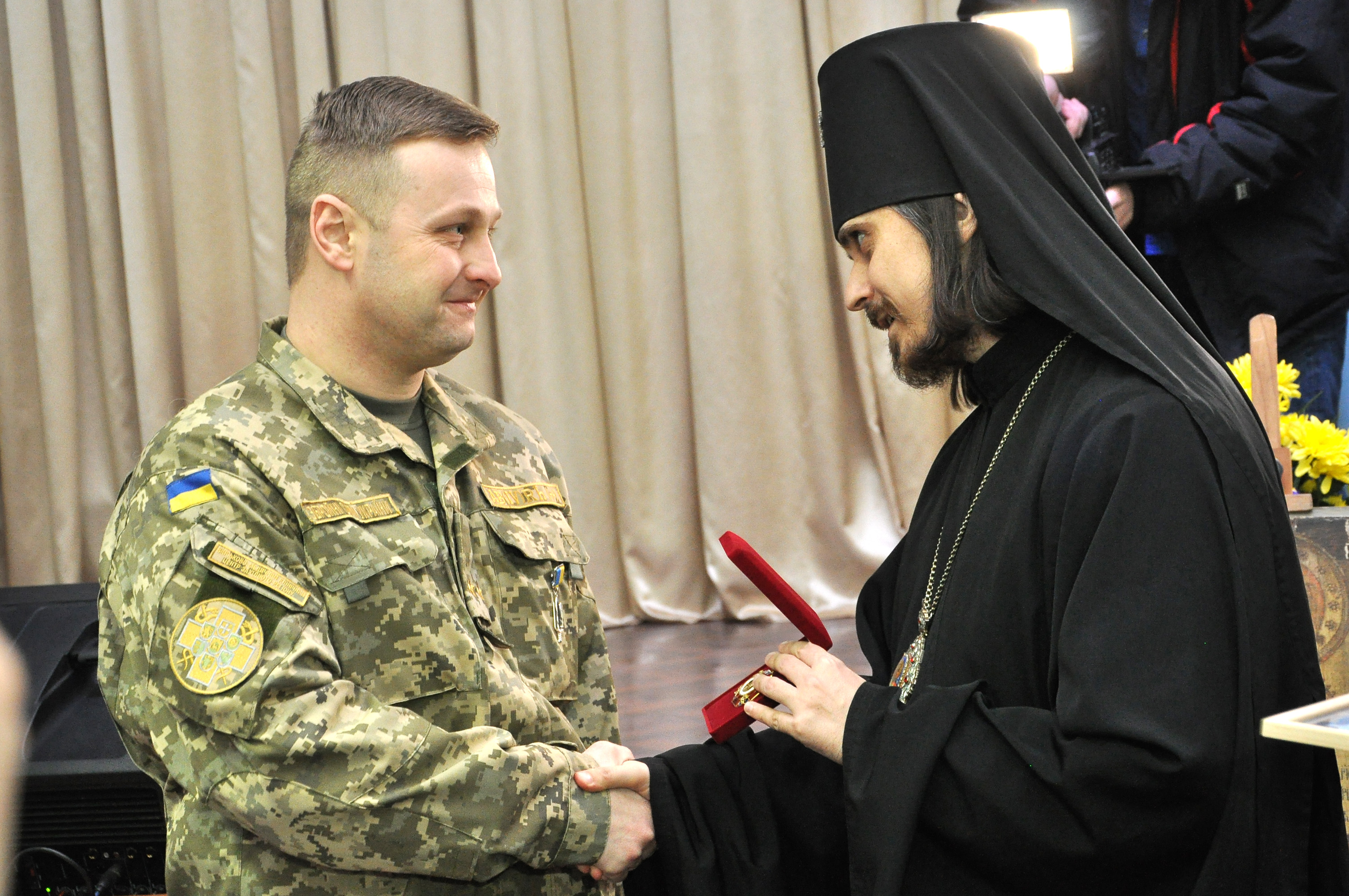 Дмитро Лось отримує орден «За спасіння життя» з рук архієпископа Нестора на церемонії нагородження в Тернопільському державному медичному університеті імені І. Я. Горбачевського 15 березня 2016 року.